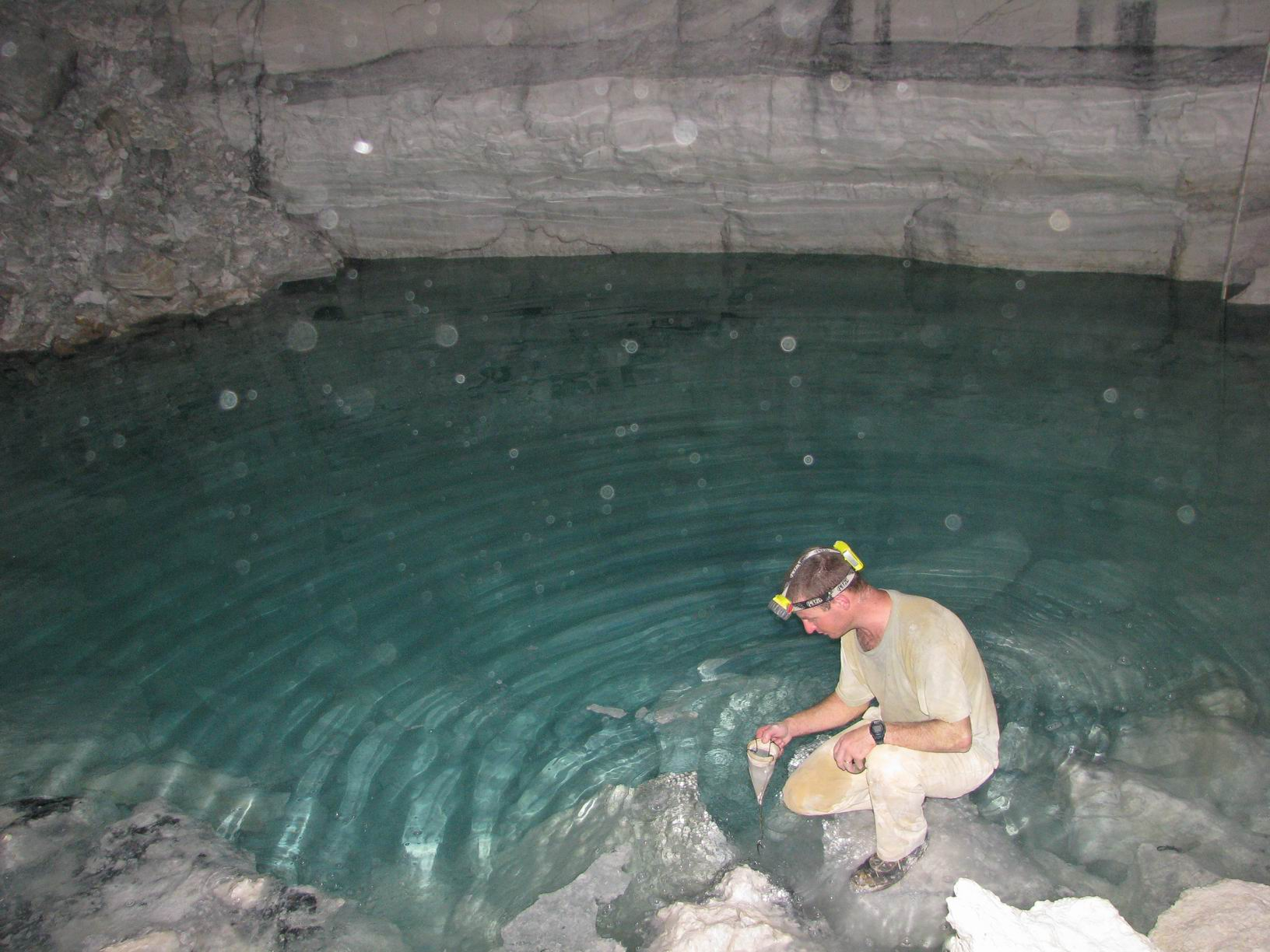 סינון מים בעזרת רשת פלנקטון לצורך איפיון בעלי חיים זעירים (שטרגל וחד תאיים) החיים במים